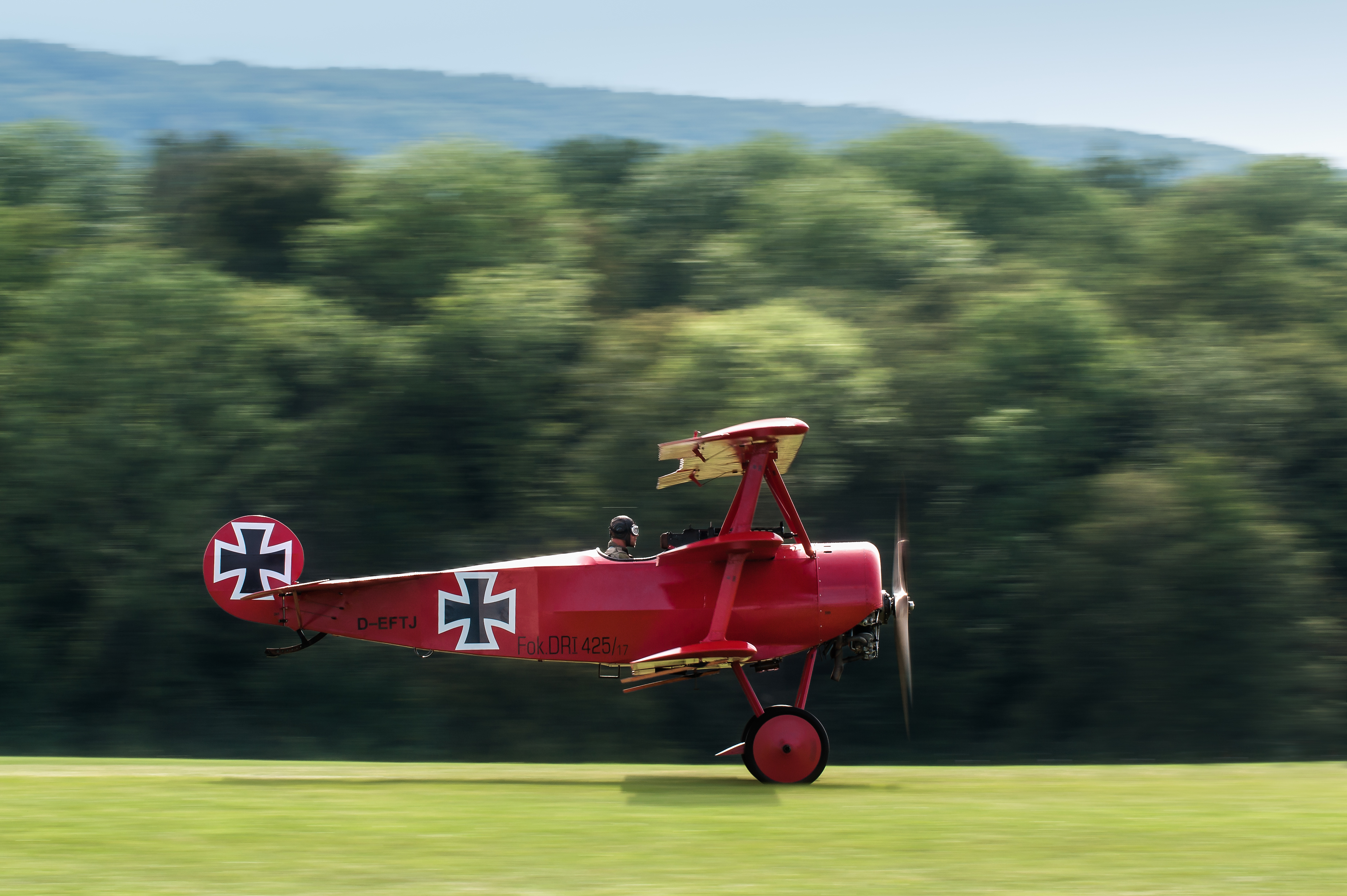 Dieses Foto wurde beim Oldtimer Fliegertreffen, 2013 am Flugfeld Hahnweide bei Kirchheim unter Teck aufgenommen. Es zeigt eine Fokker DR.1 Replika beim Start